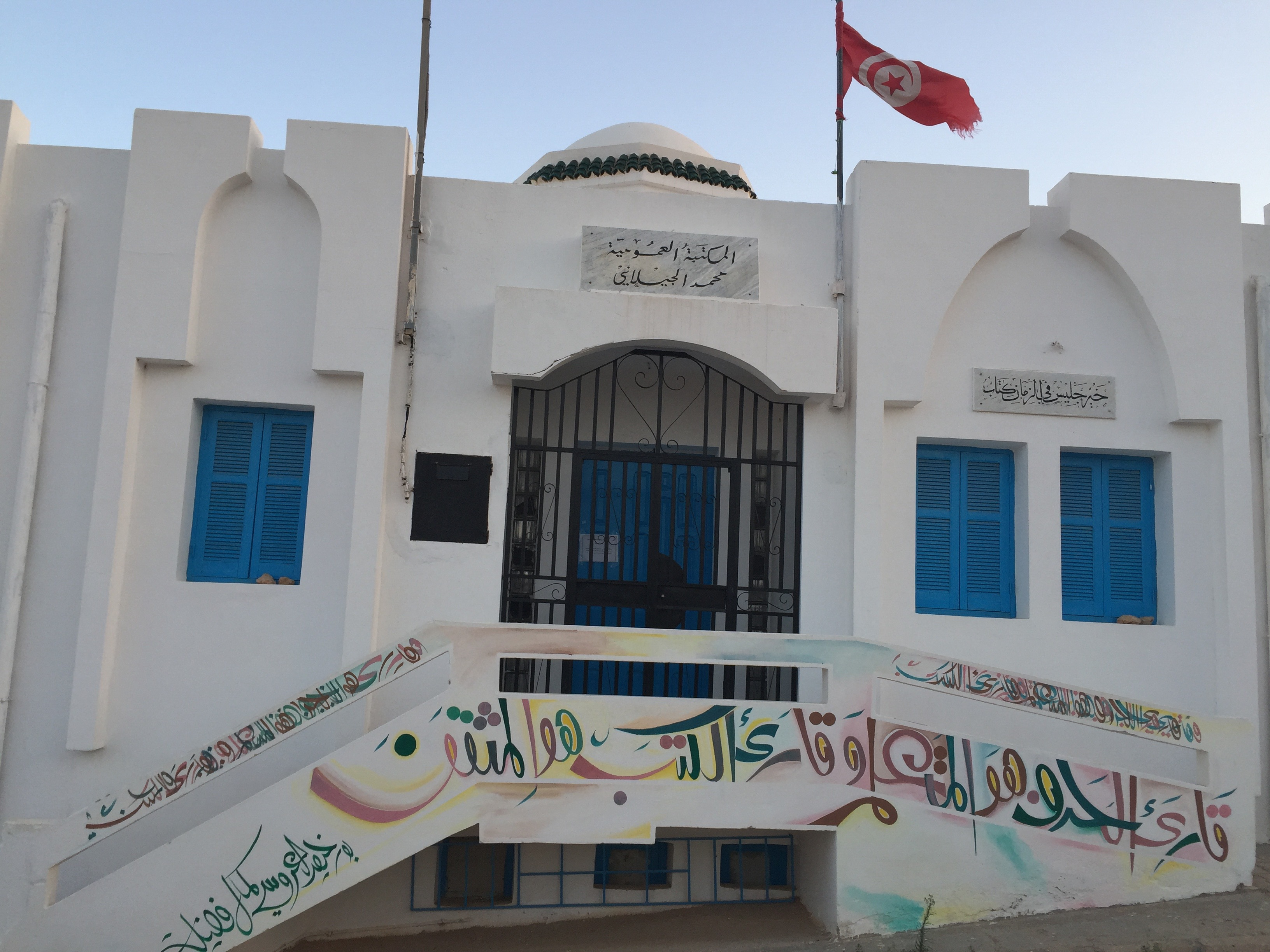 Bibliothèque publique Mohamed Jilani Ksar Hadada juillet 2016.